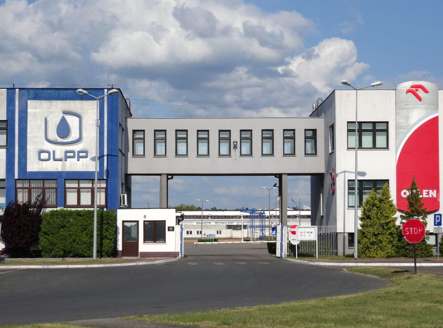 Operator Logistyczny Paliw Płynnych Zespół Baz Paliw nr 2 w Nowej Wsi Wielkiej, powiat bydgoski